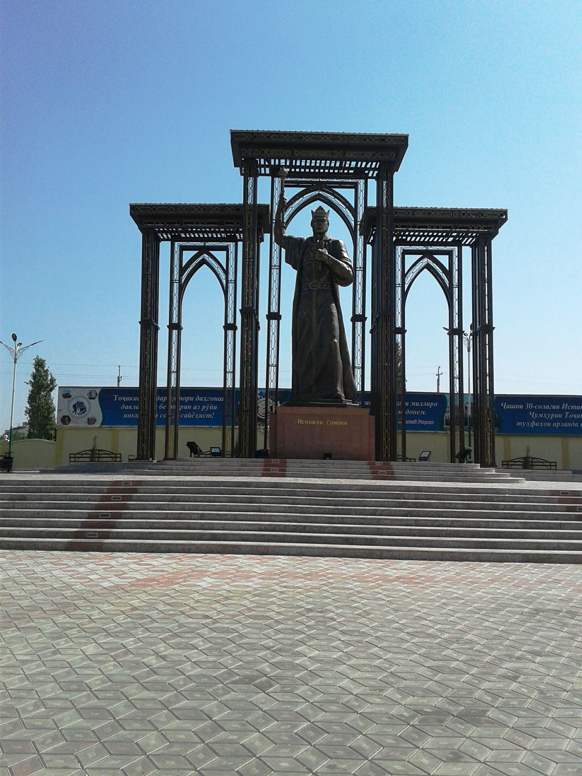 Монумент Исмоили Сомони, г. Канибадам